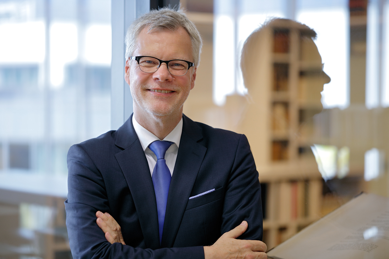 Jan-Pieter Barbian, Direktor der Stadtbibliothek (3. Etage)